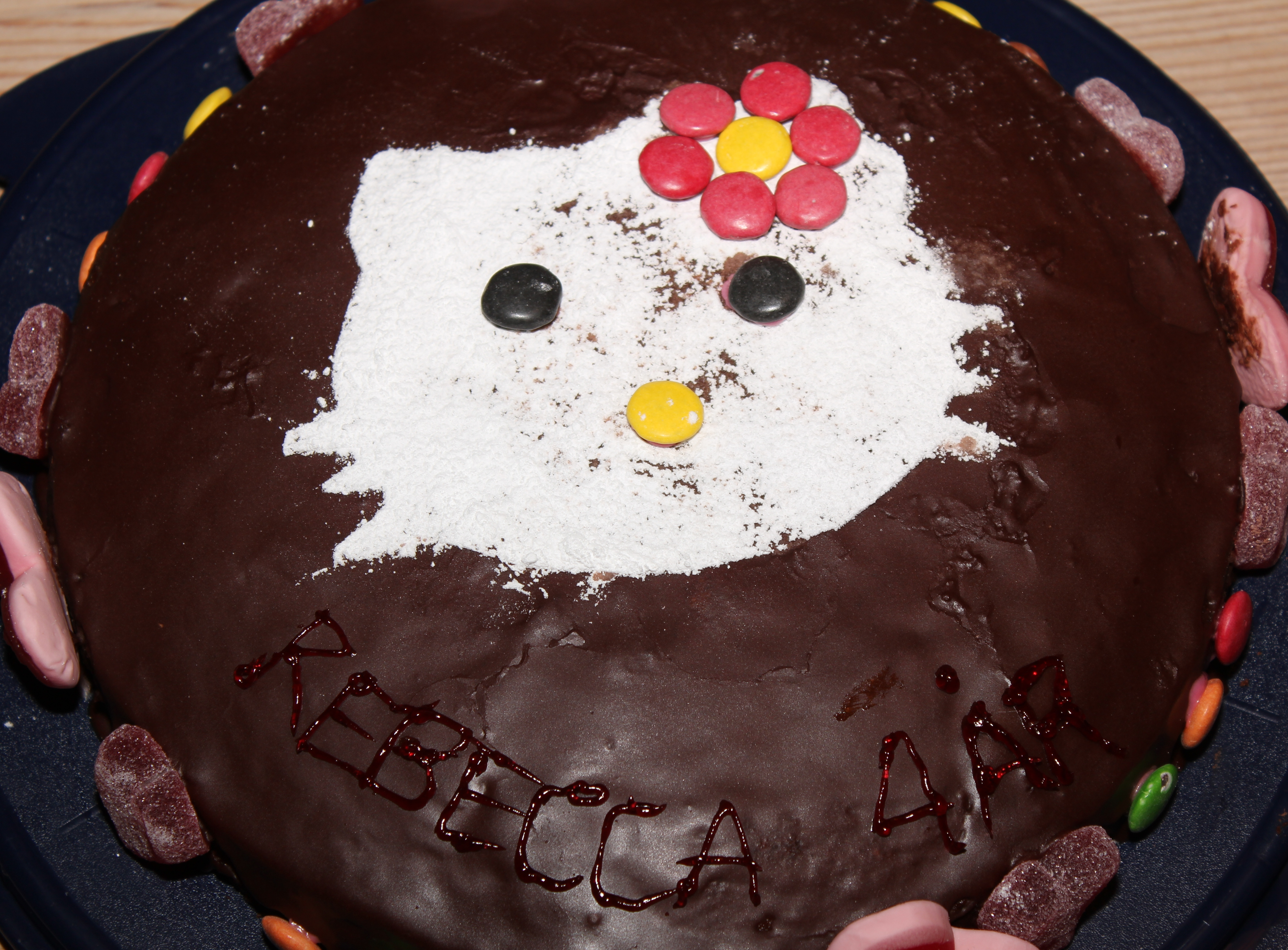 Bursdagskake